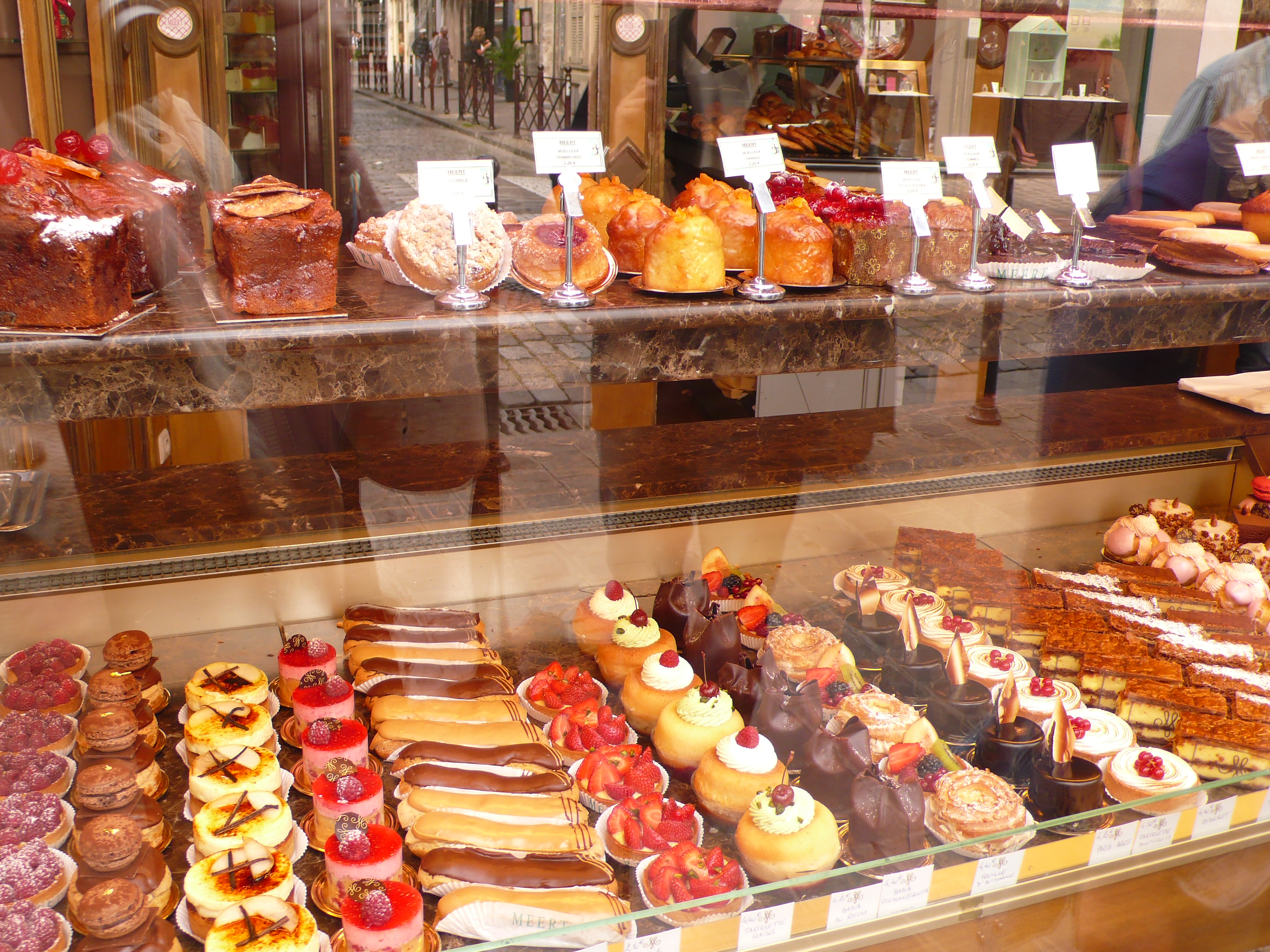 Lille, Pâtisserie Meert, Rue Esquermoise.